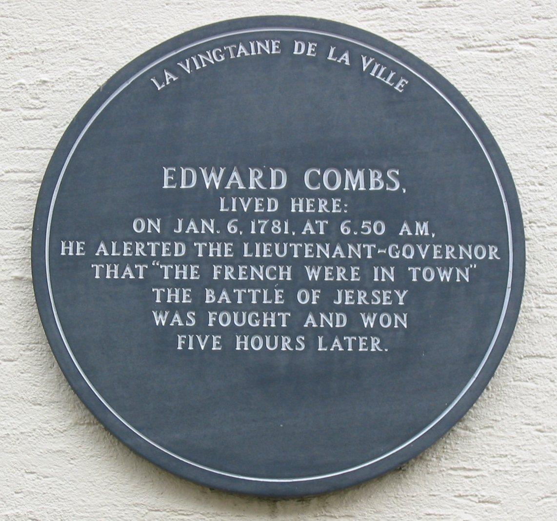 Nrf: Saint Hélyi, Jèrri